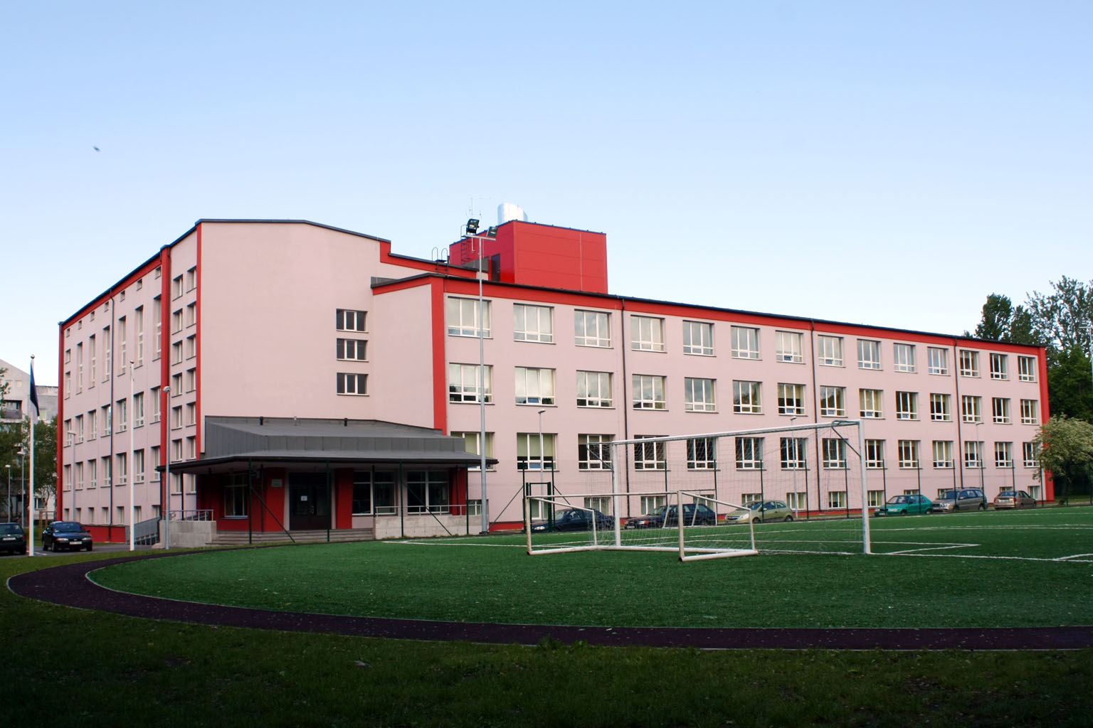 Karjamaa Gümnaasium, Tallinn